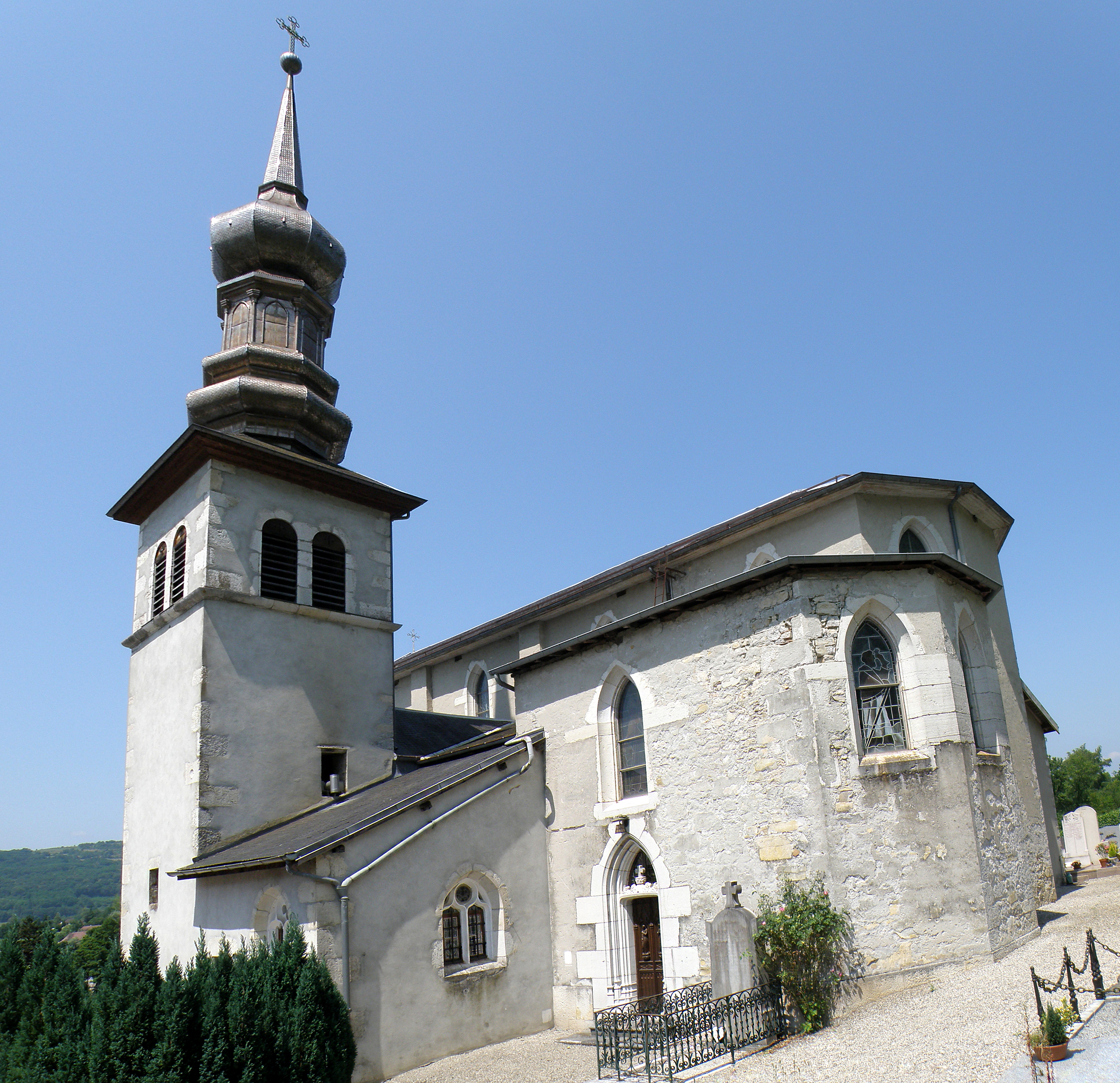 Lucey, comm. du département de la Savoie (région Rhônes-Alpes, France). Église paroissiale Saint-Étienne.